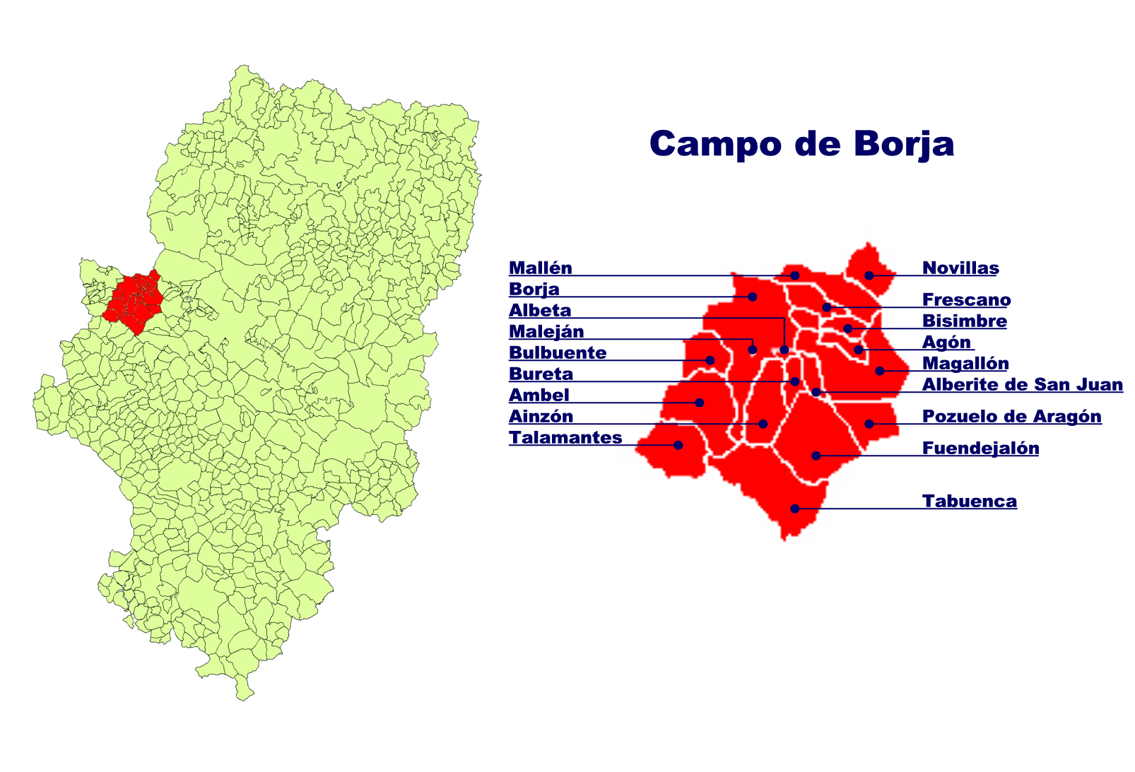 Comarca de Campo de Borja Creado el 13.10.2005 por Ecelan en base a Image:Aragon municipalities.png